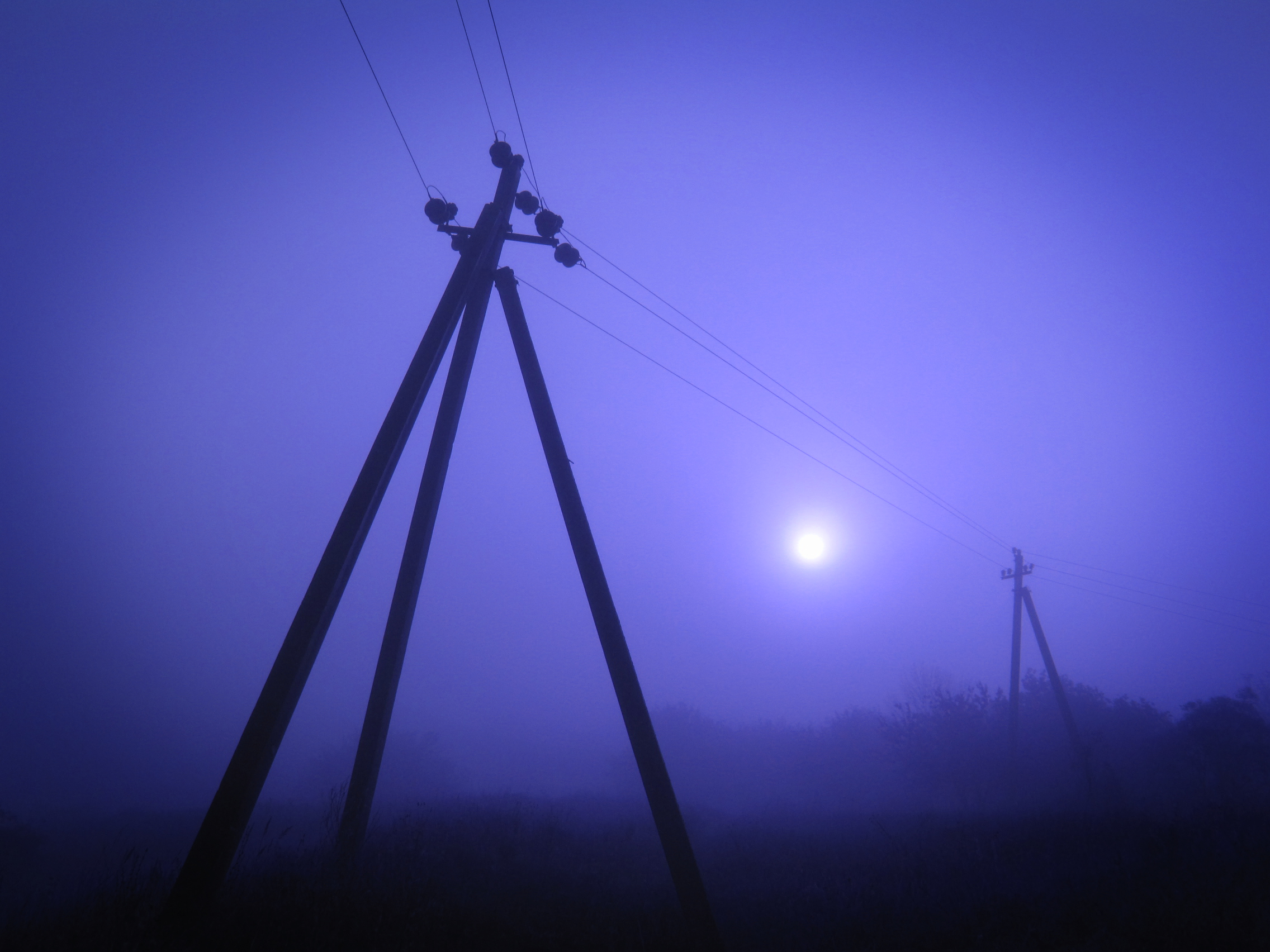 Железобетонная опора ЛЭП 10 кВ в Тоннельной балке, г. Днепр